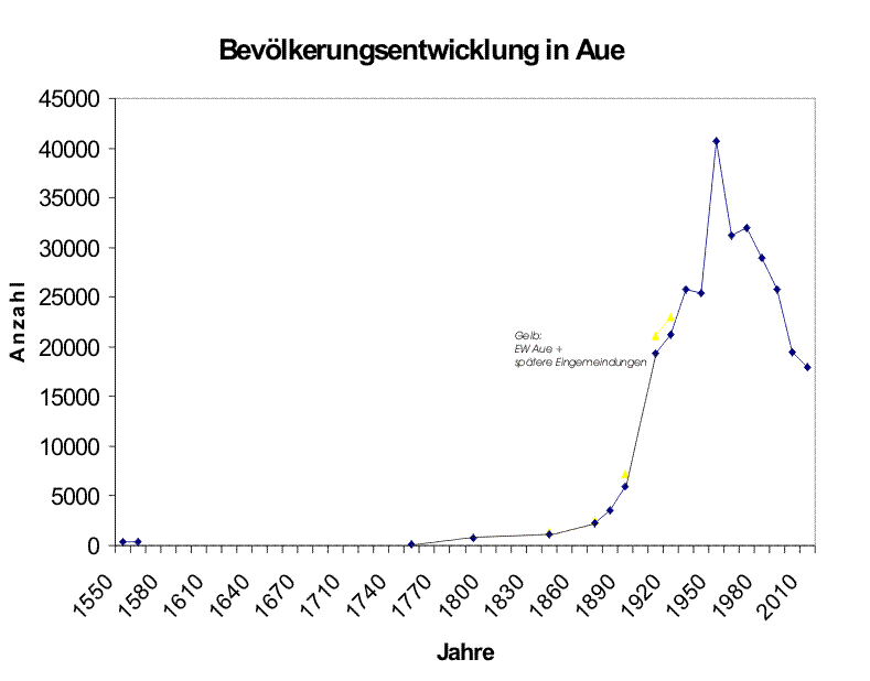 Bevölkerungsentwicklung von Aue von 1551 bis 2006